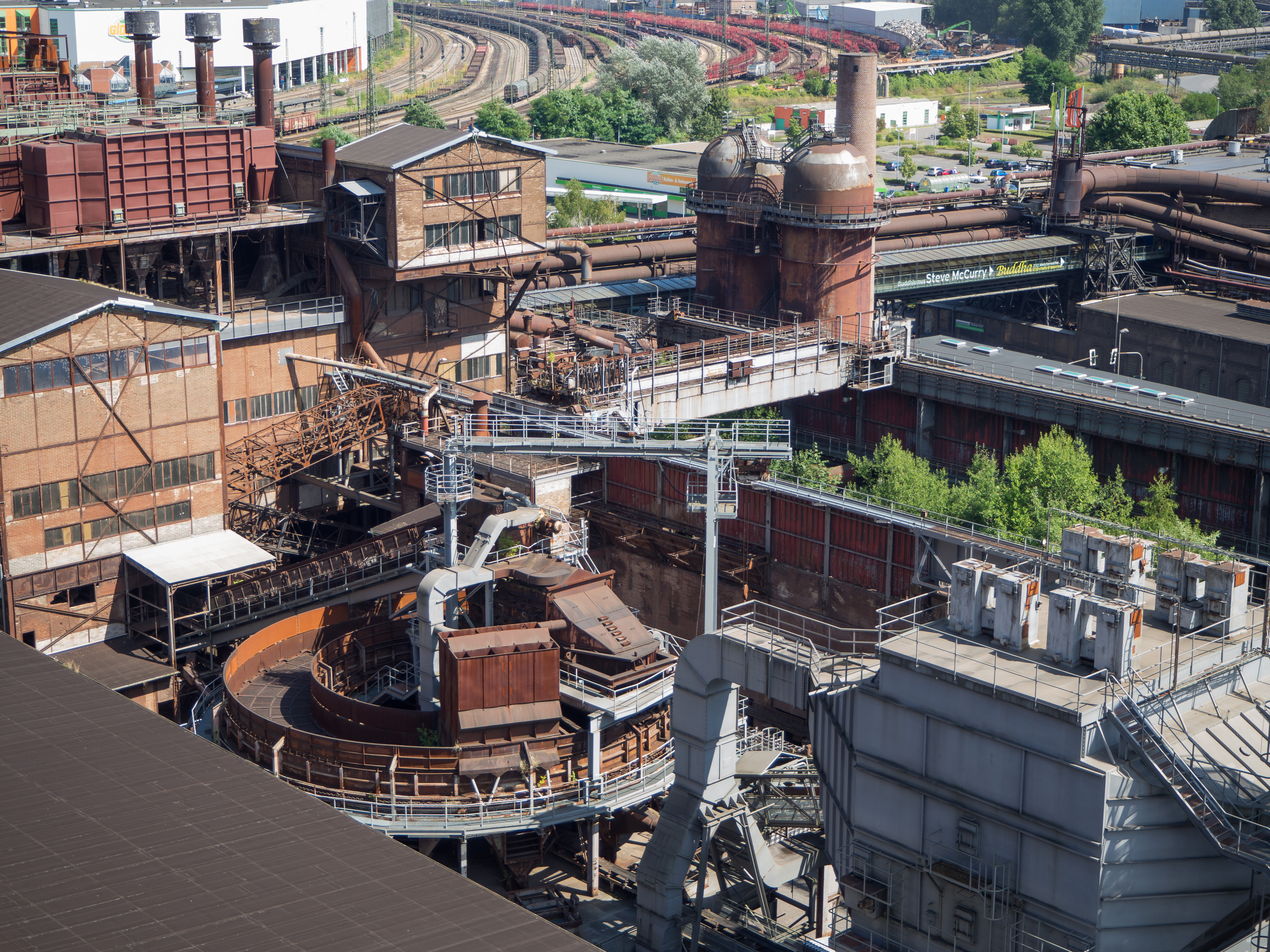 Völklinger Hütte